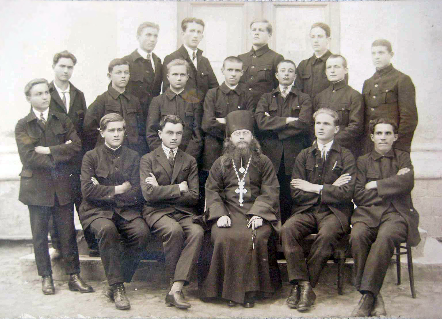 Stricevo skolovanje - Bitoljska bogoslovija, 1925 g.